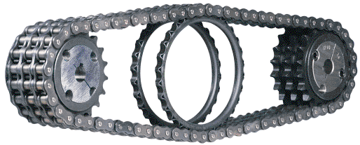 ROLL-RING im Triplexkettentrieb